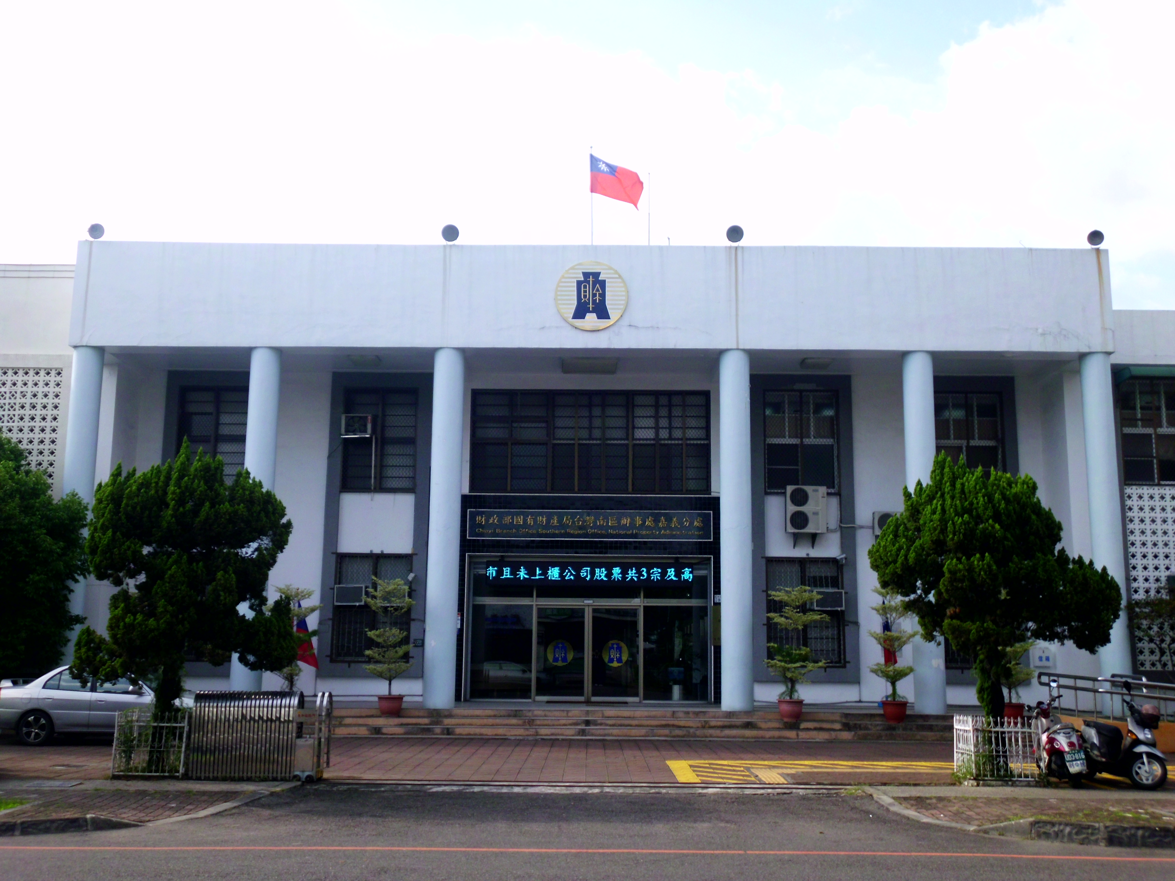 財政部國有財產局臺灣南區辦事處嘉義分處（今財政部國有財產署南區分署嘉義辦事處），位於嘉義市東區中山路94號，原臺灣嘉義地方法院建築。